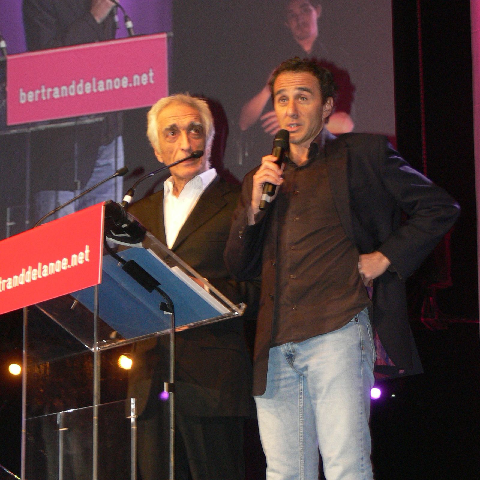 Gérard Darmon & Élie Semoun au meeting de Bertrand Delanoé, en février 2008